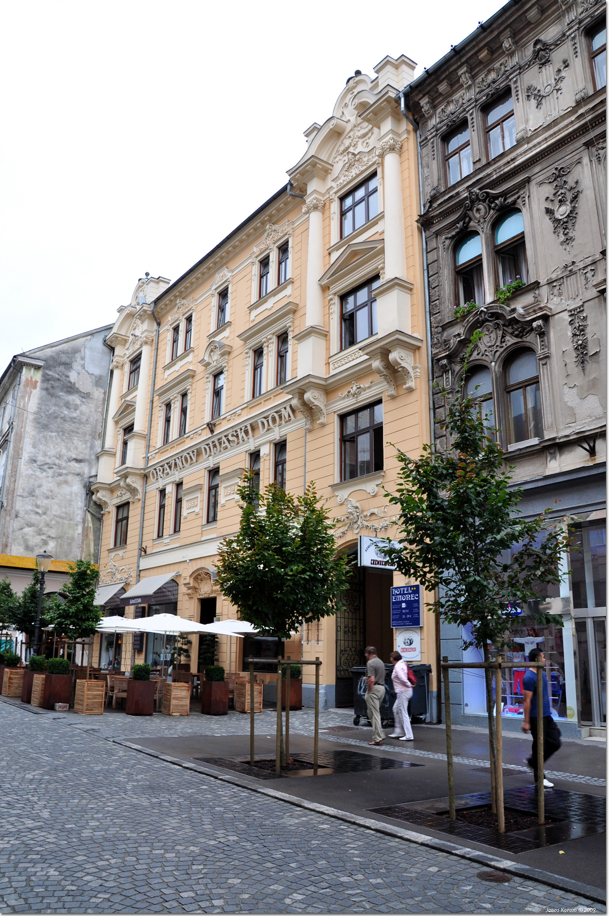 Ljubljana (75)